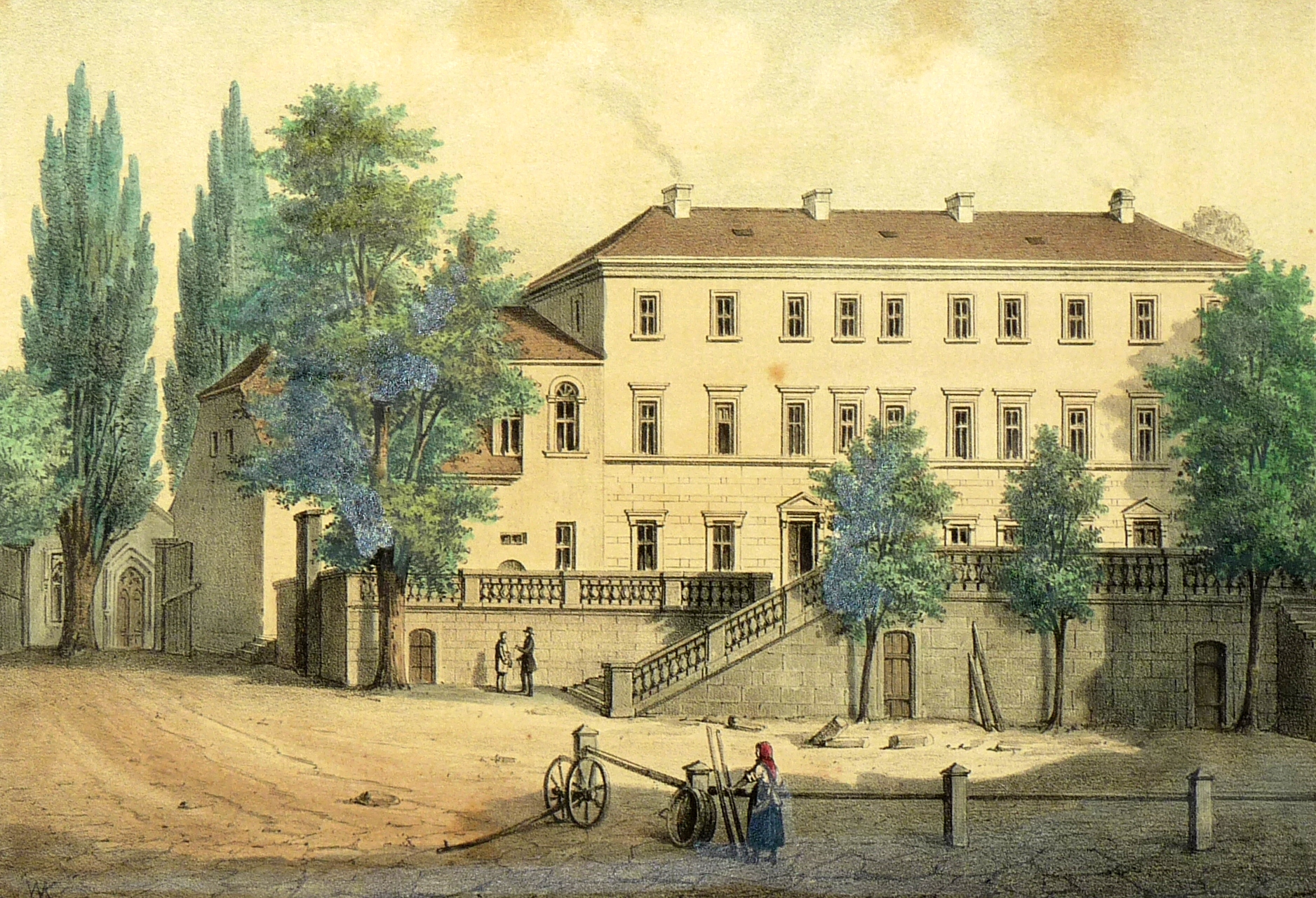 farbige Lithographie des Schlosses Cotta um 1855